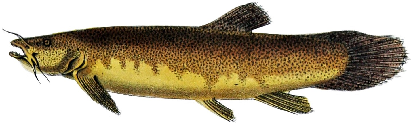 Trichomycterus punctatissimus